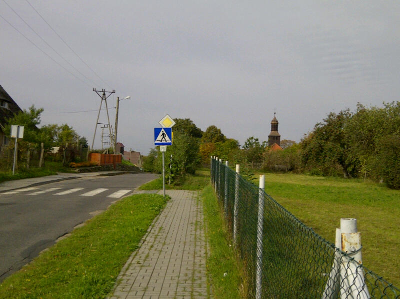 Jarnatów, gezien vanaf het noordoost